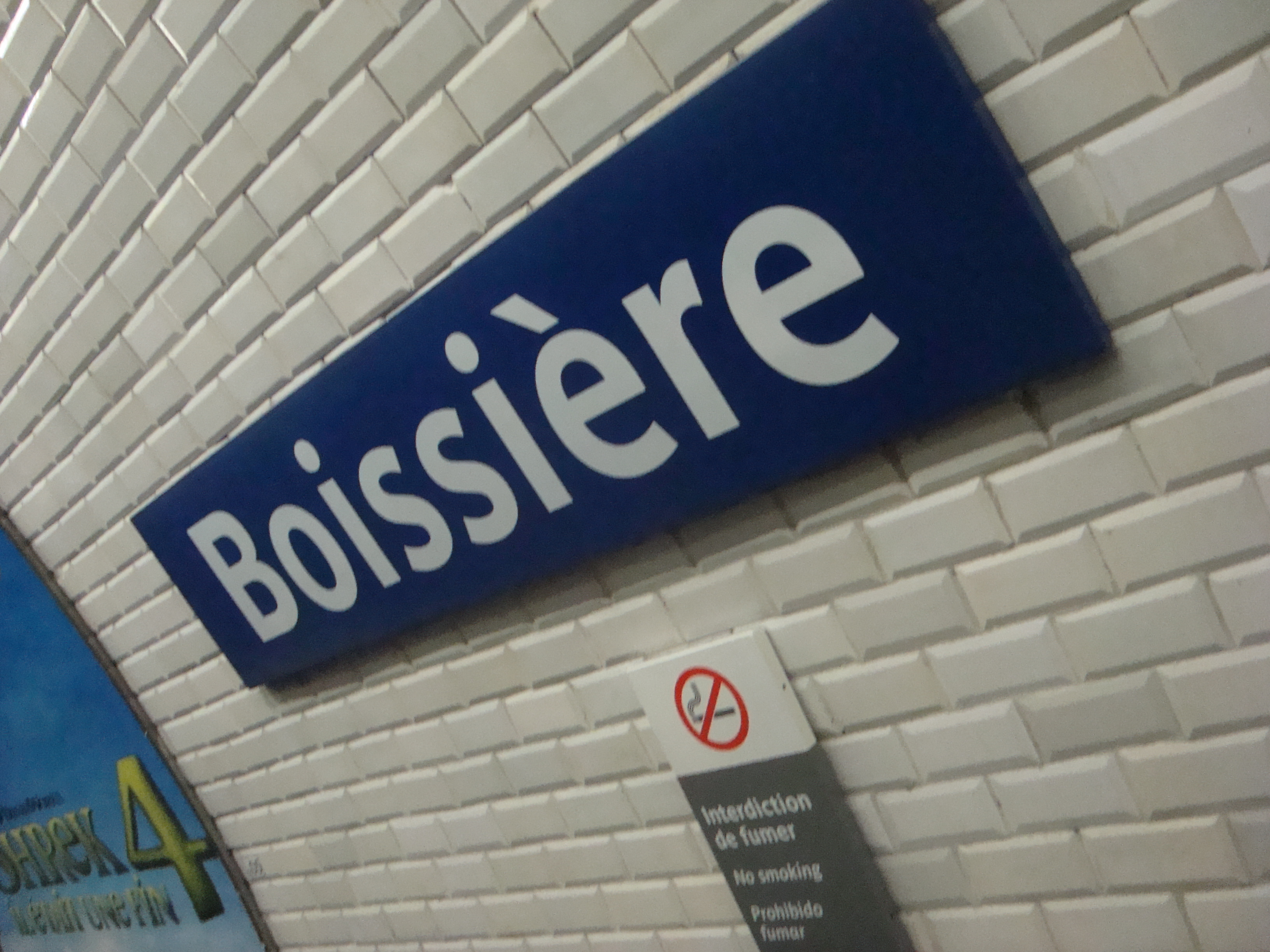 Plaque de la station de métro Boissière sur la ligne 6 du métro de Paris.